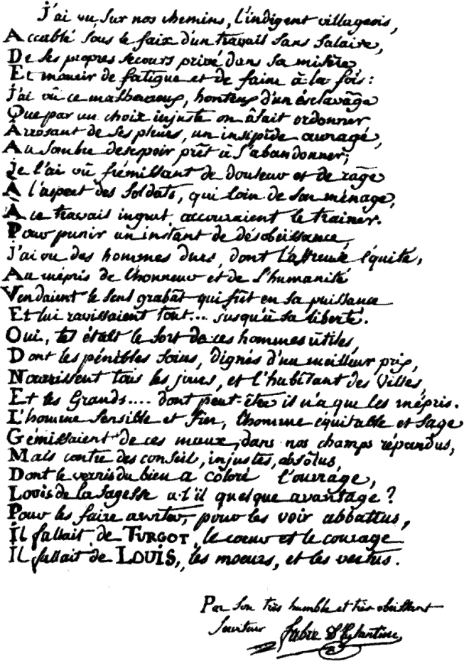 An Epistle by Fabre d'Églantine Turgot.